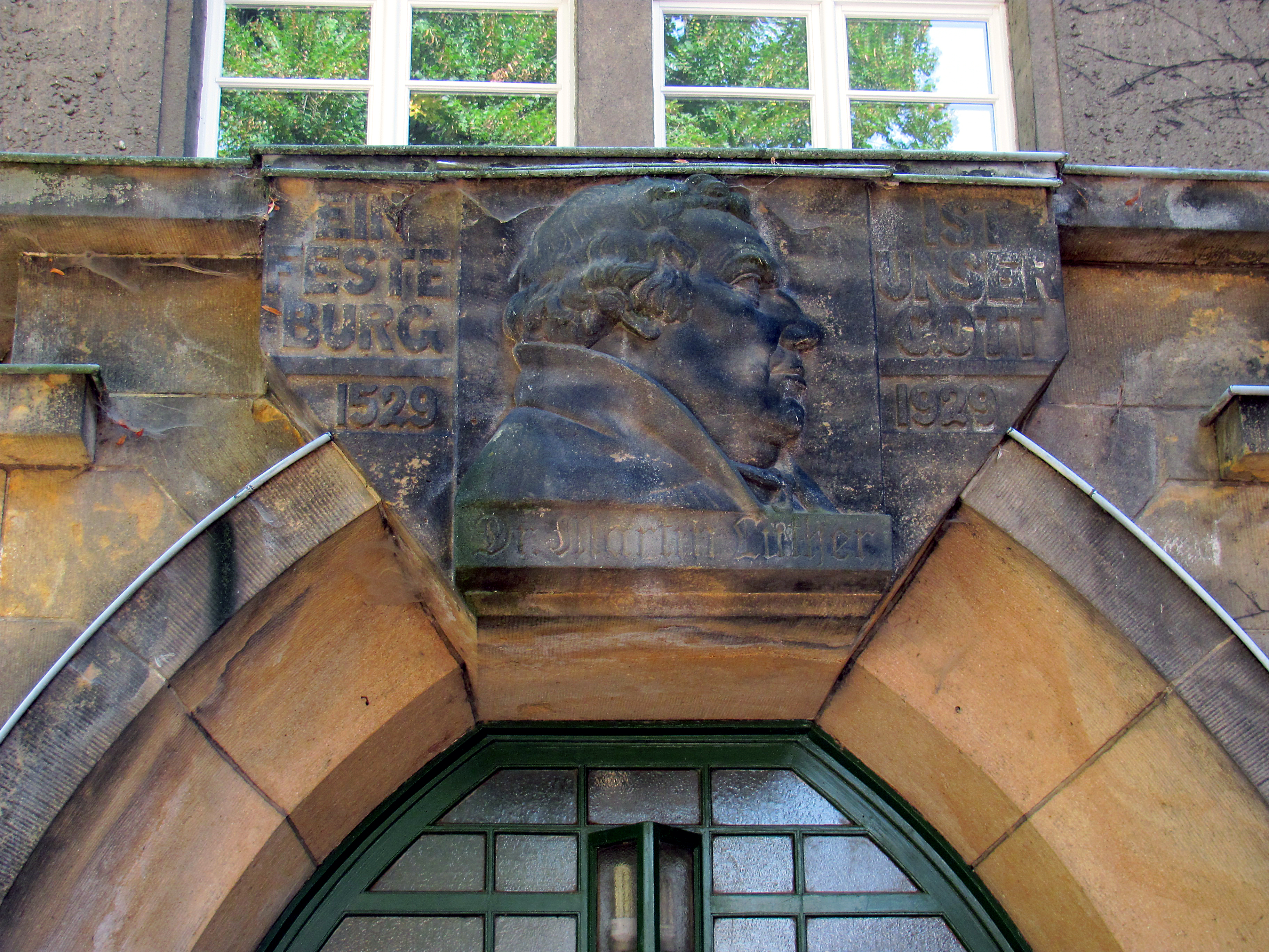 Radebeul-Kötzschenbroda, Lutherhaus (Radebeul), Lutherrelief über der Eingangstür zum Luthersaal